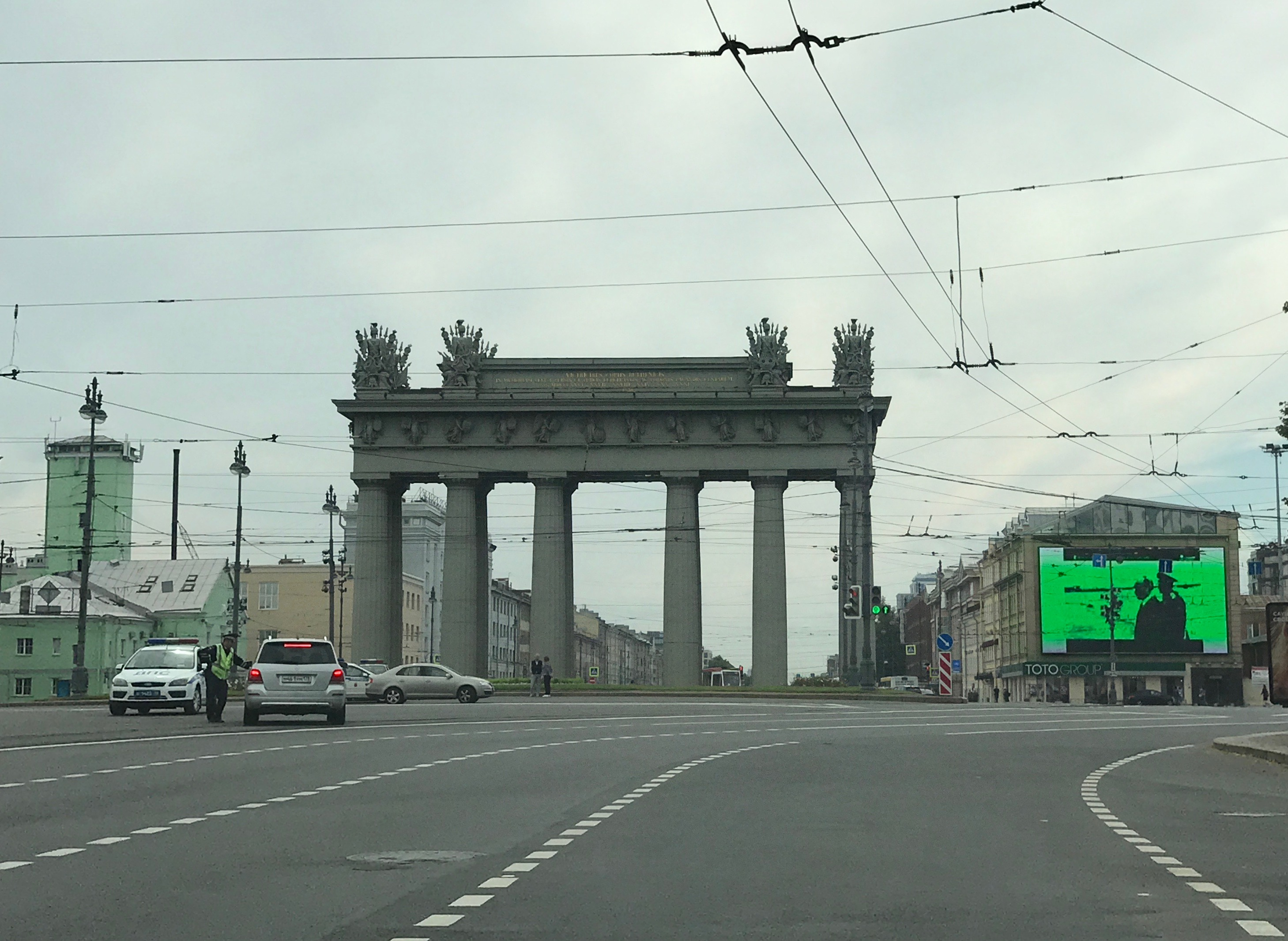 Московские ворота 2017